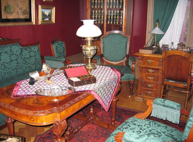 Stuckatörens våning, herrummet